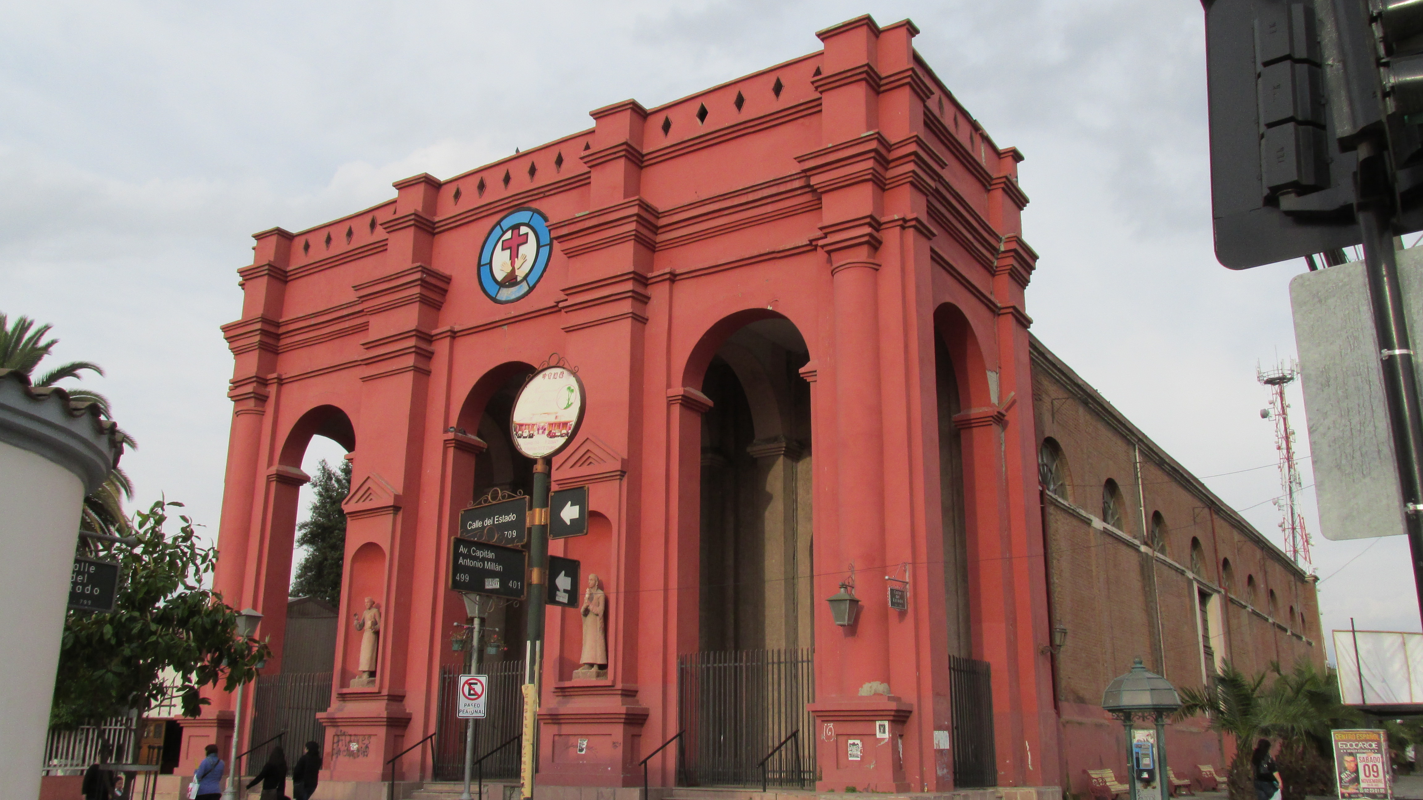 Frontis Iglesia San Francisco